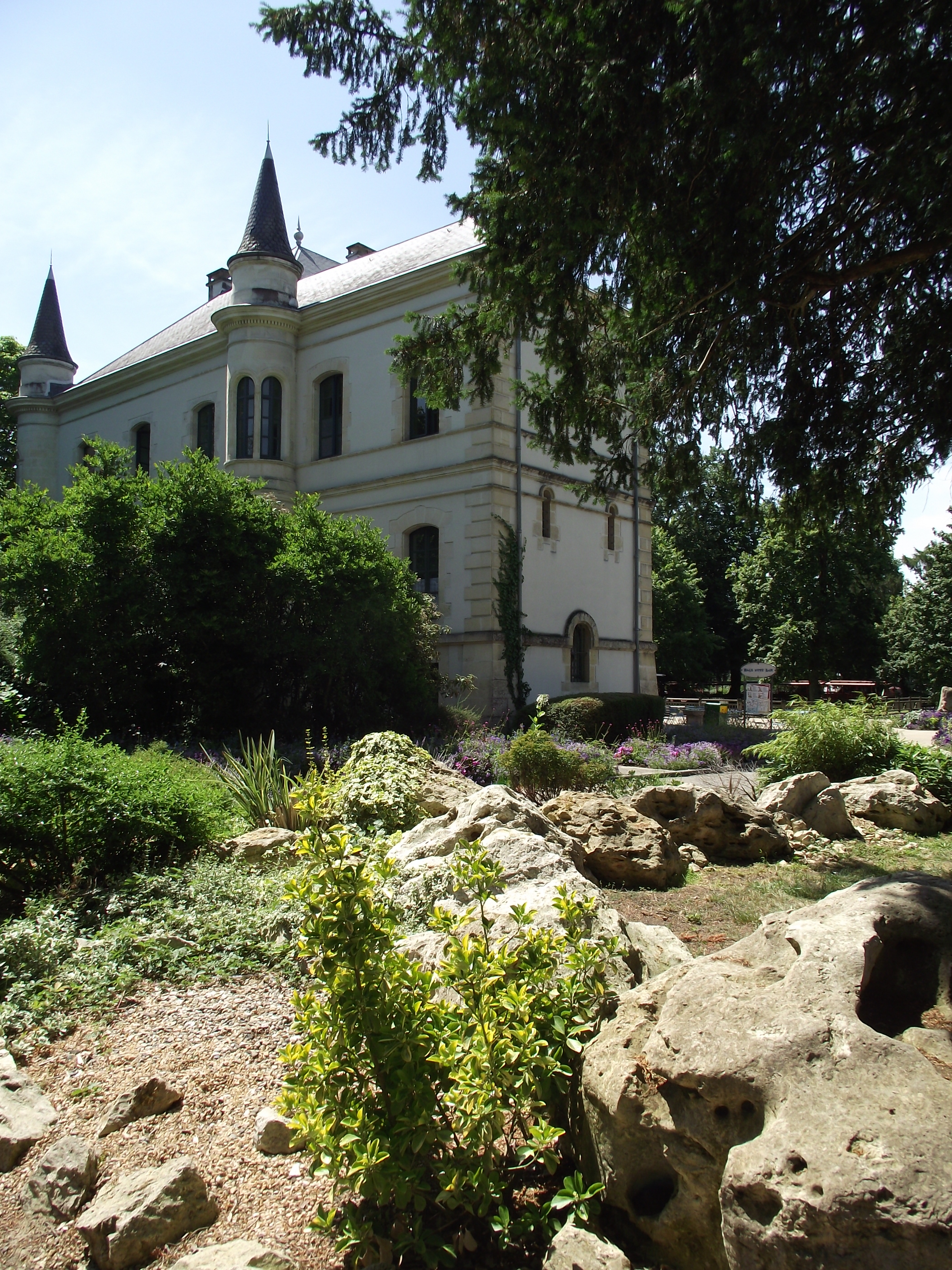 Château Walibi Sud-Ouest